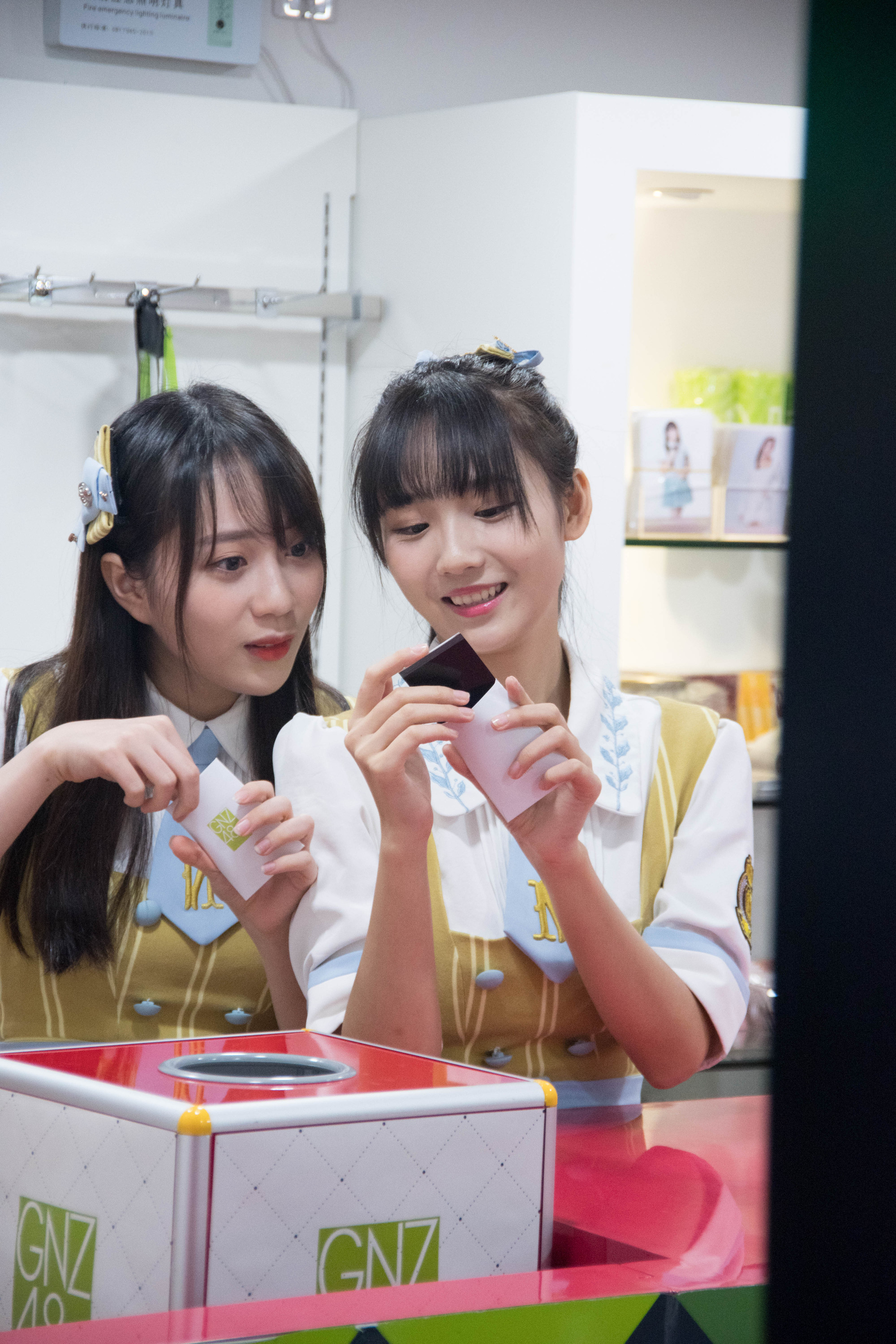 20171003——一日店员服务（刘力菲、郑丹妮）